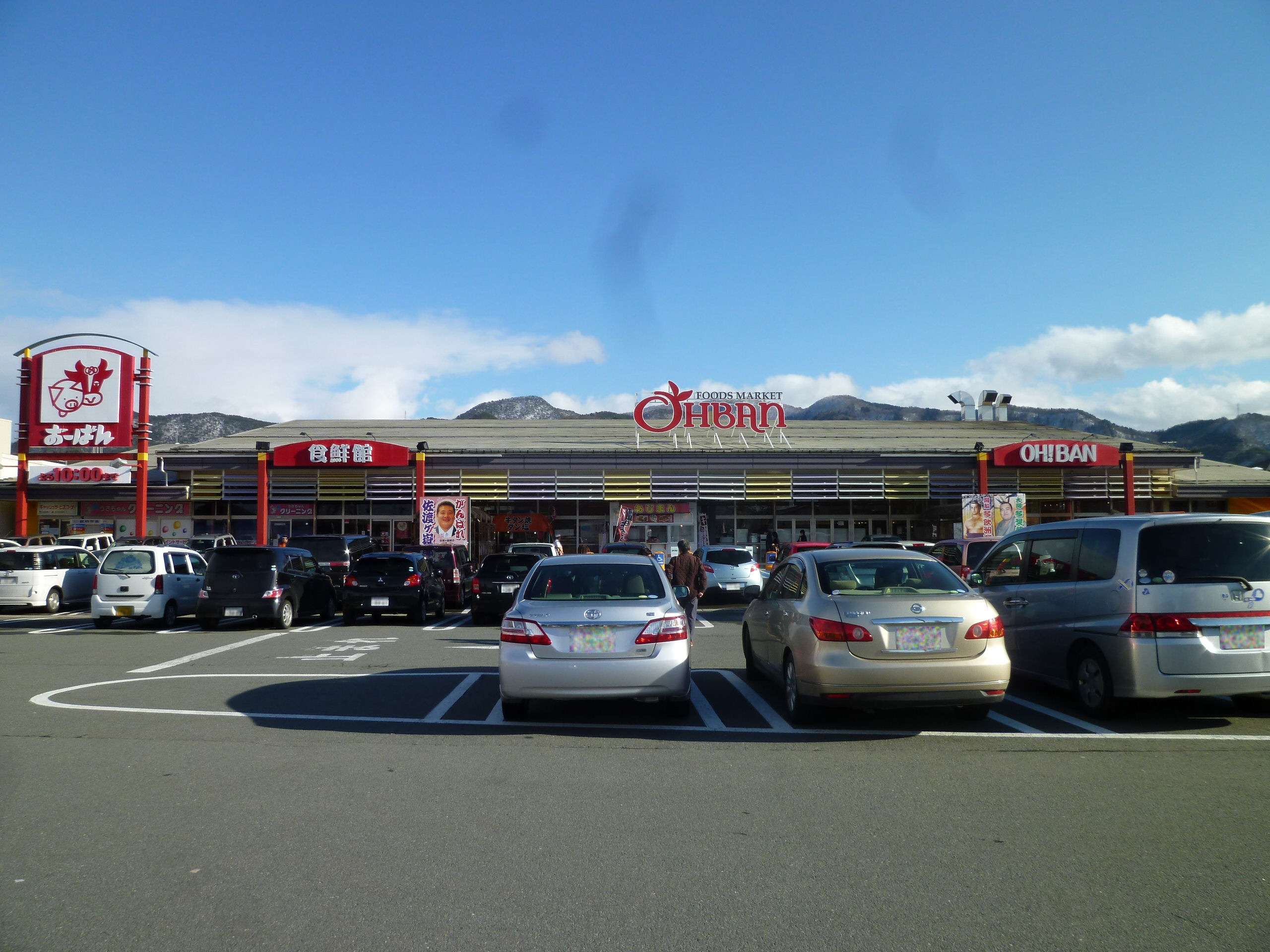 スーパーマーケットおーばん（山形東店）。 山形県山形市五十鈴に所在。